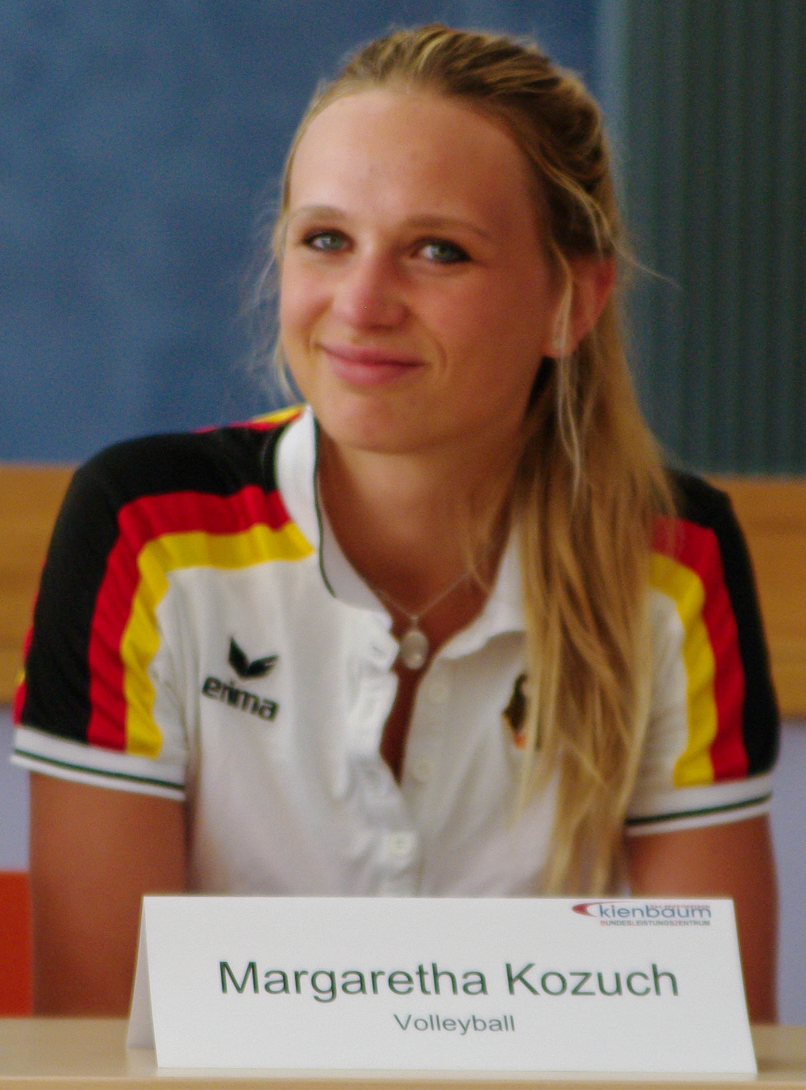 Medientag am 23. Juli 2013 im Bundesleistungszentrum Kienbaum